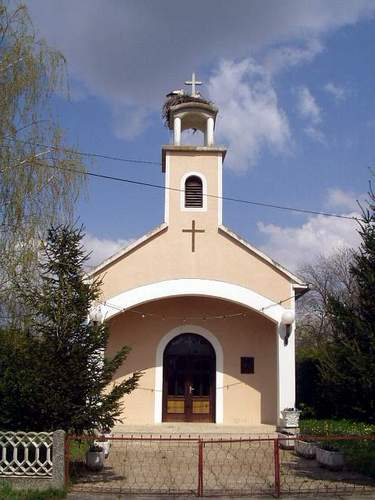 kapelica u Gaju